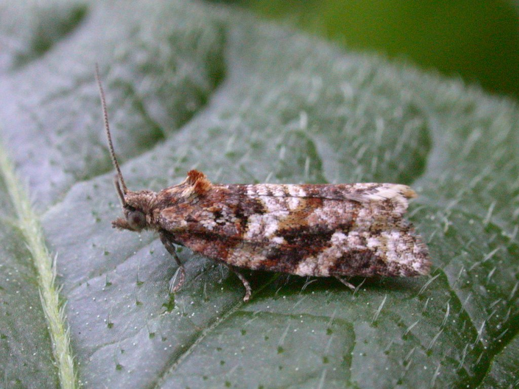 Argyrotaenia ljungiana (Tortricidae)